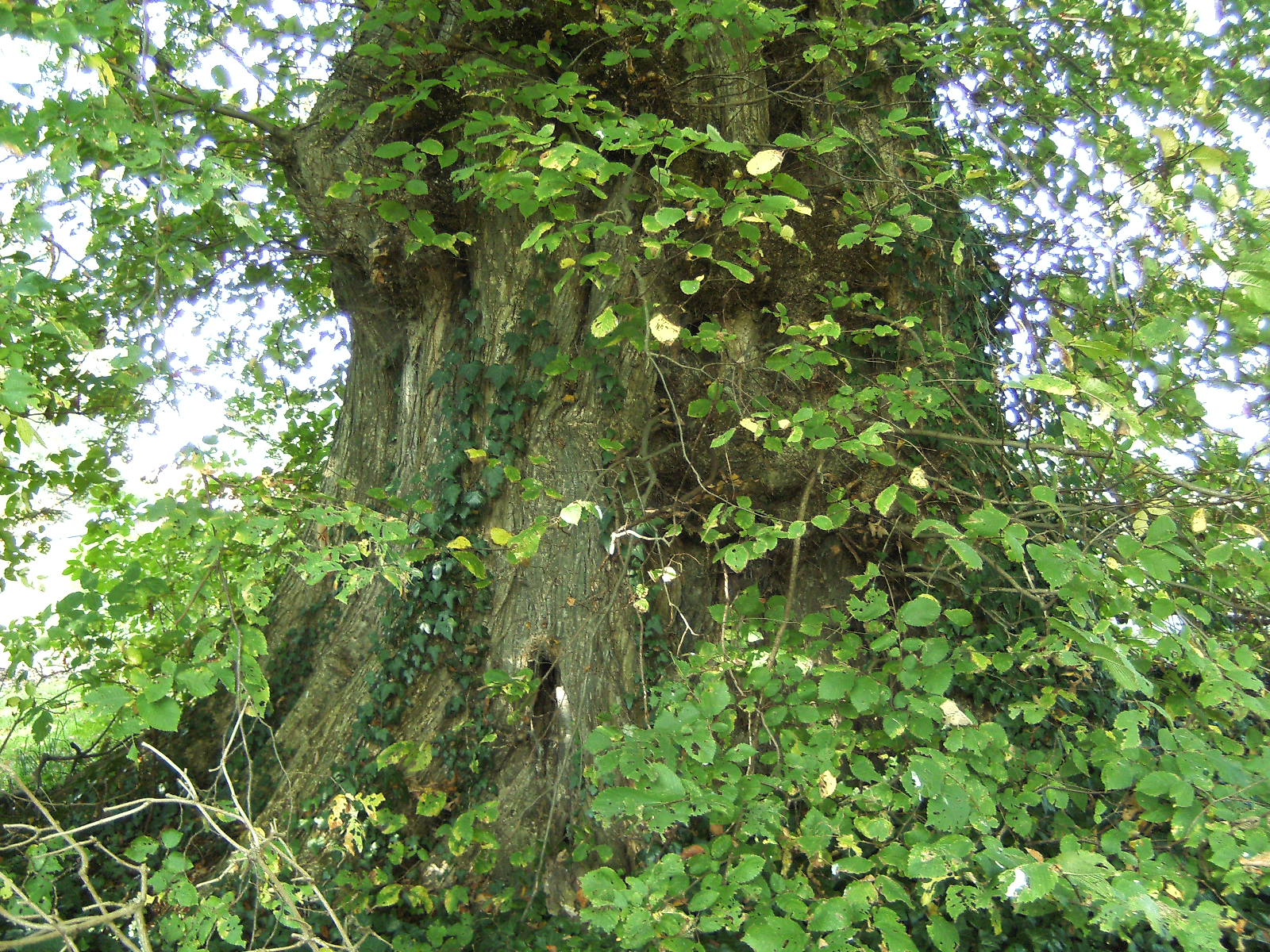 Fladderiep geplant in de buurtschap Heure bij Borculo in ca. 1825. In 2006 met een omtrek van 578 cm de dikste geregistreerde boom in zijn soort in Nederland. De hoogte was toen 25,2 meter